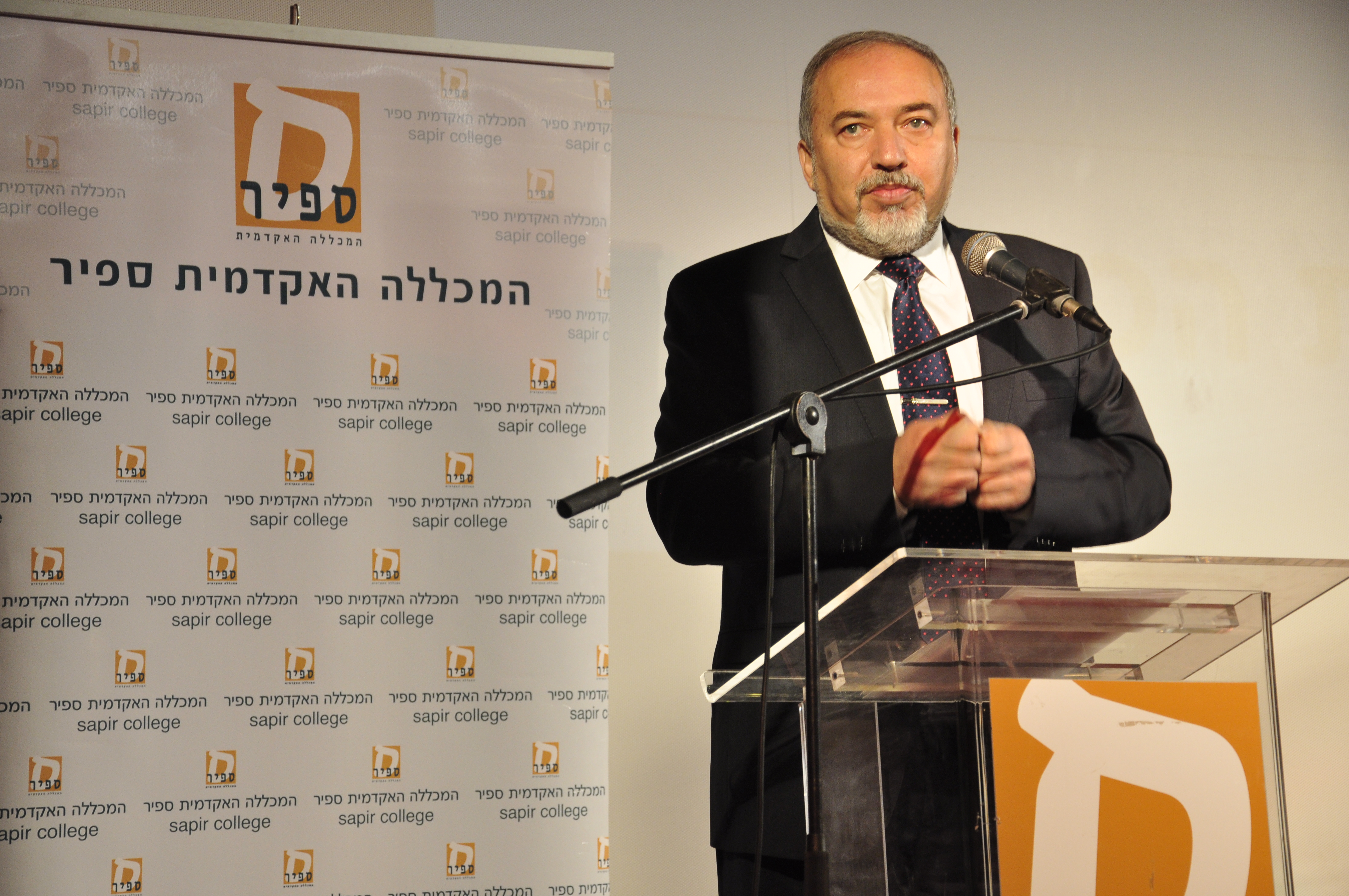 כנס שדרות לחברה במכללה האקדמית ספיר ובעיר שדרות 2015